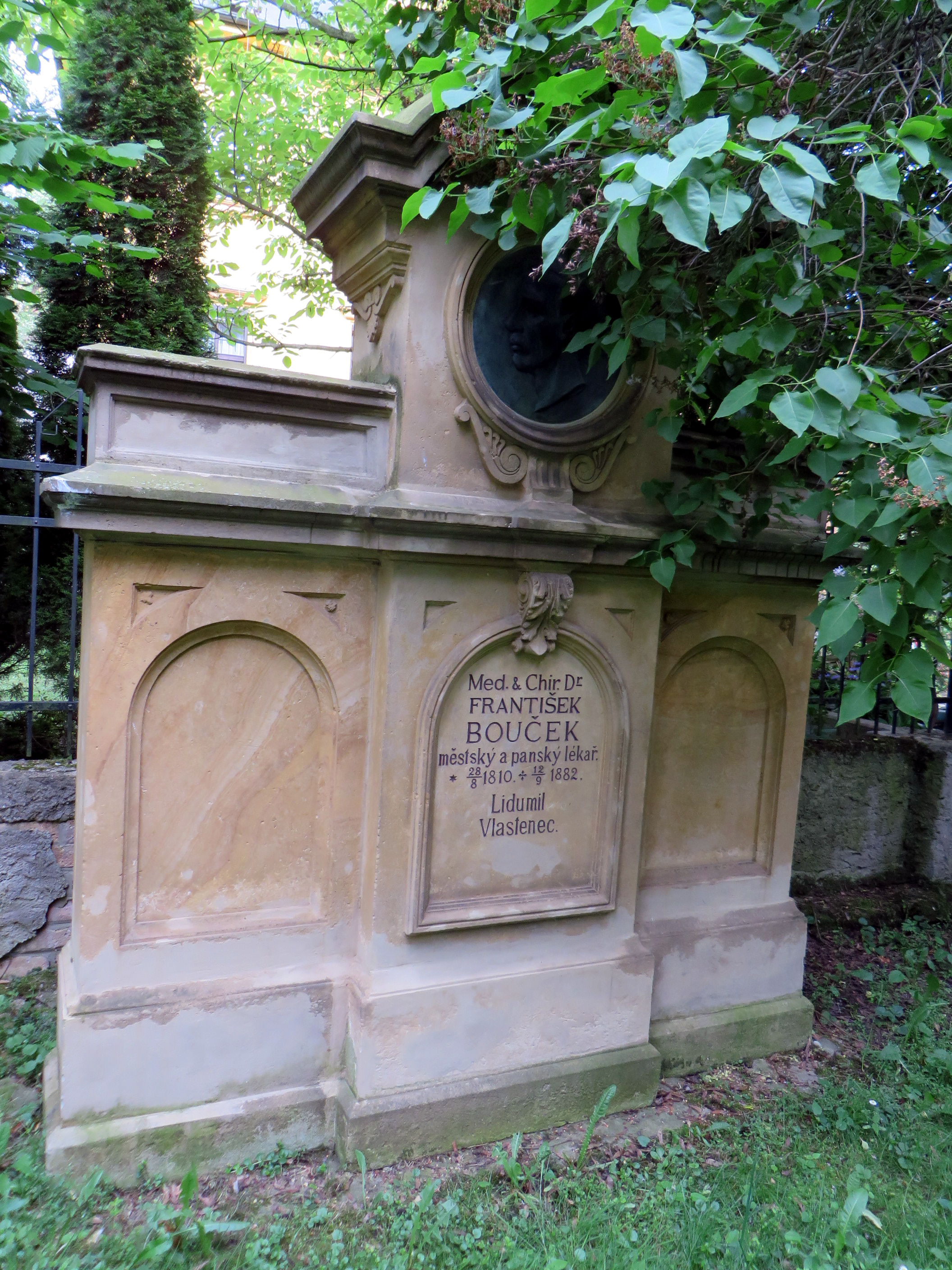 Náhrobek MUDr. Františka Boučka v Poděbradech.